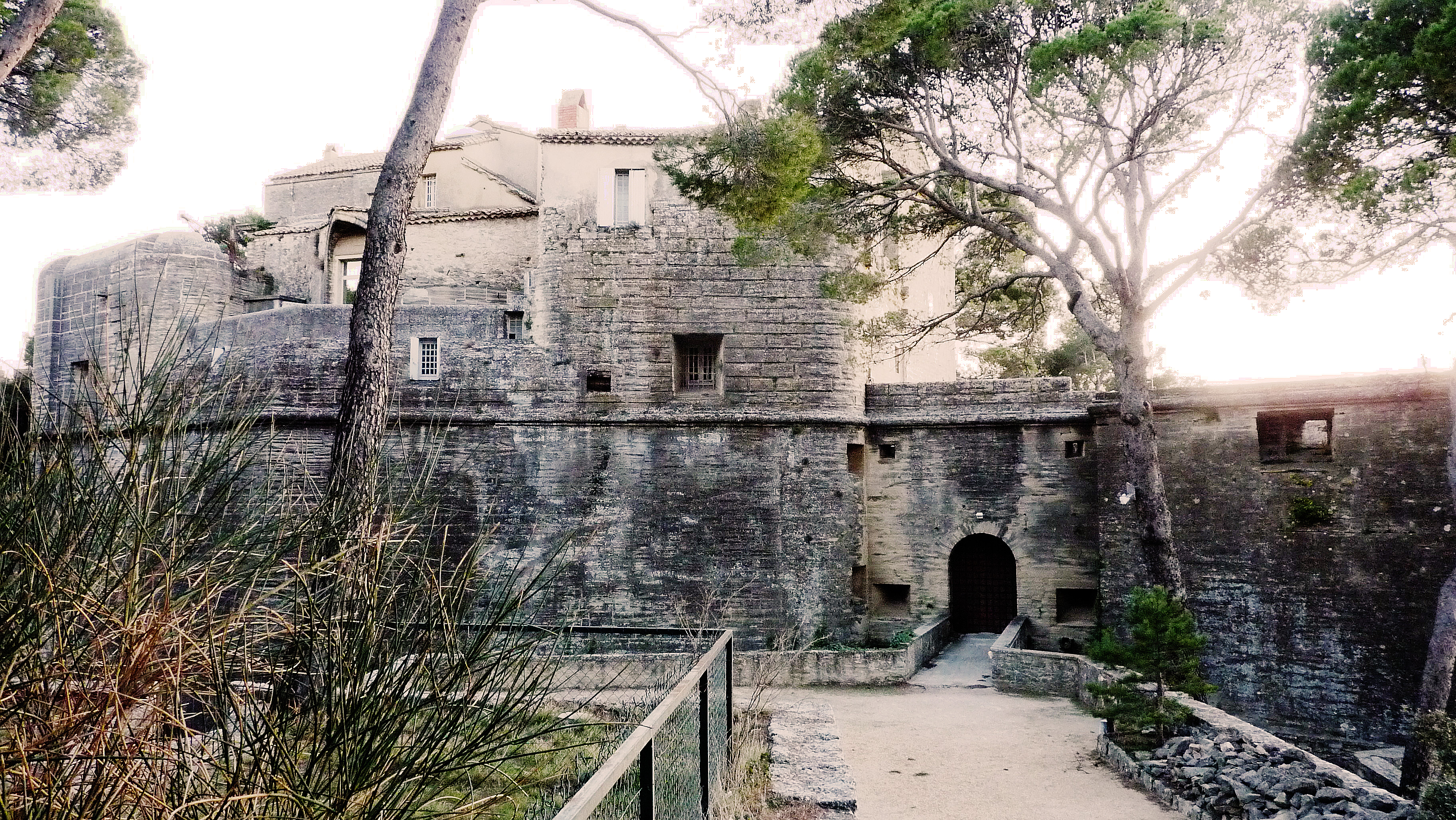 Vue générale du château de Saumane